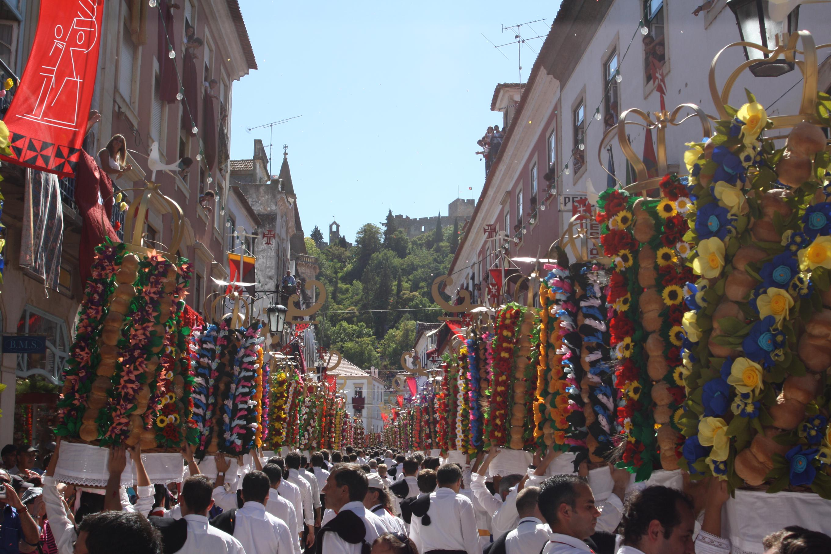 Festa dos Tabuleiros 2011